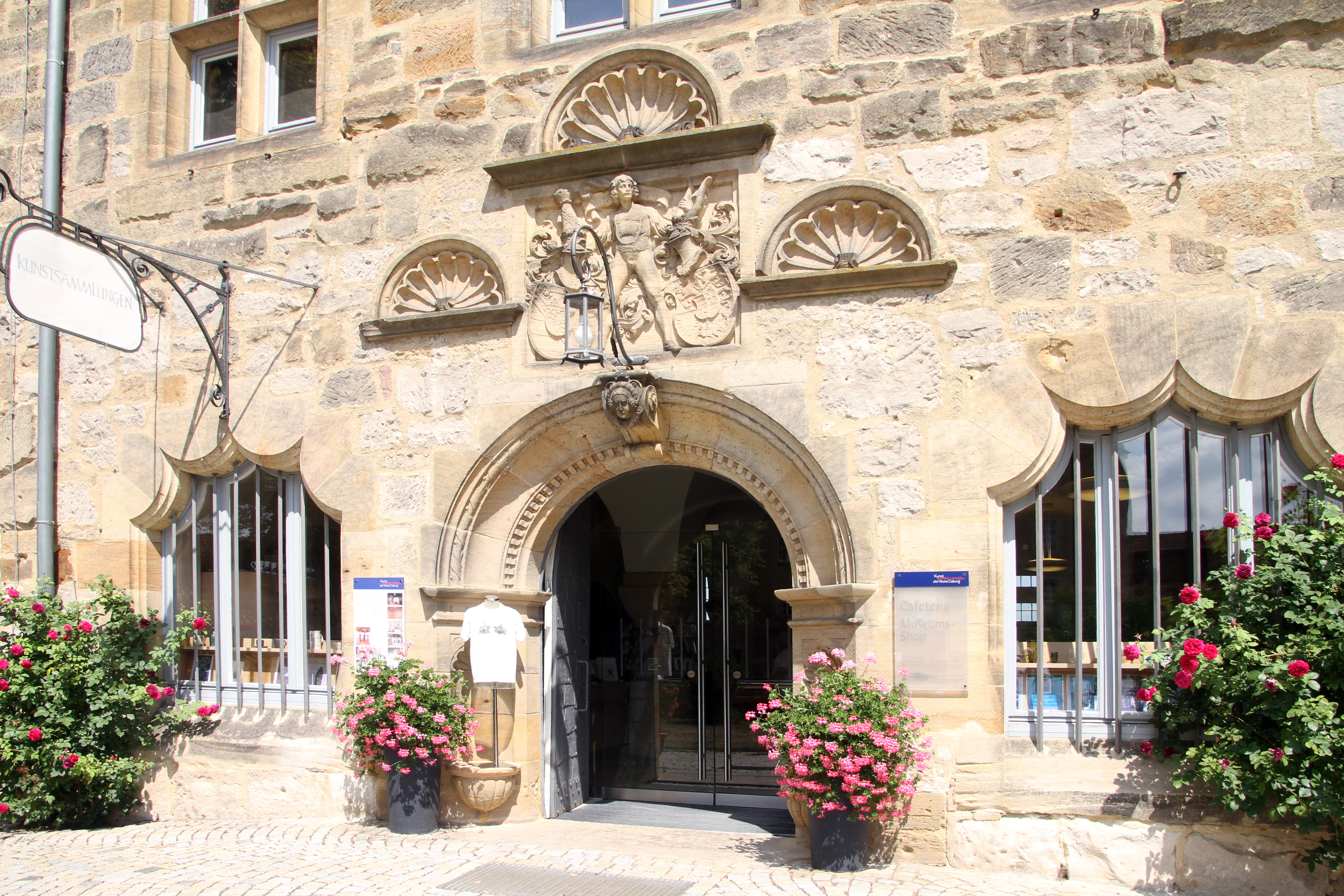 Veste Coburg